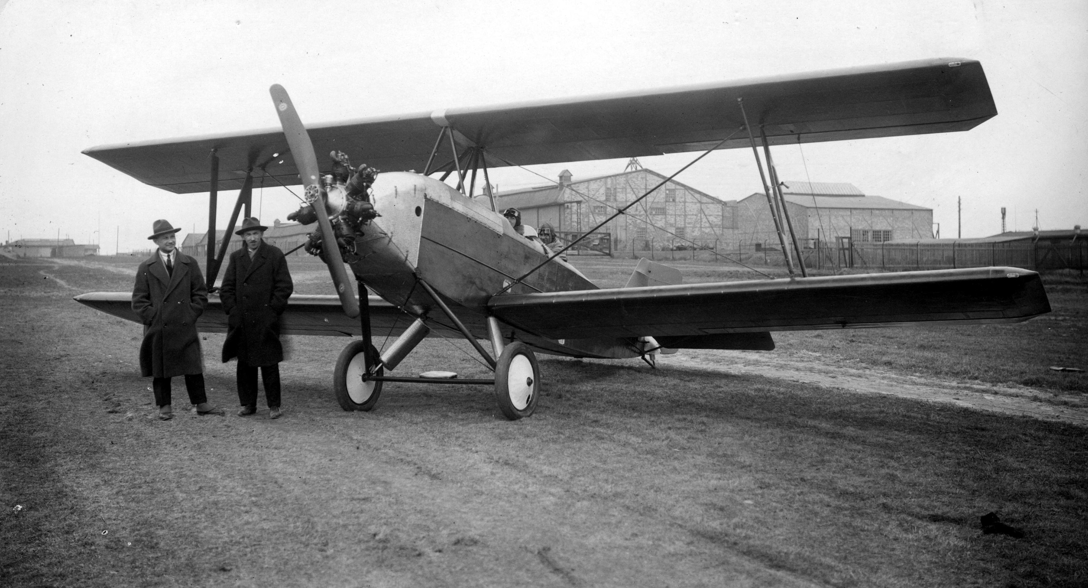 Pierwszy polski szkolny, dwumiejscowy dwupłatowiec BM-2 - sylwetka samolotu. Widoczny na zdjęciu inż. Ryszard Bartel (pierwszy z lewej).